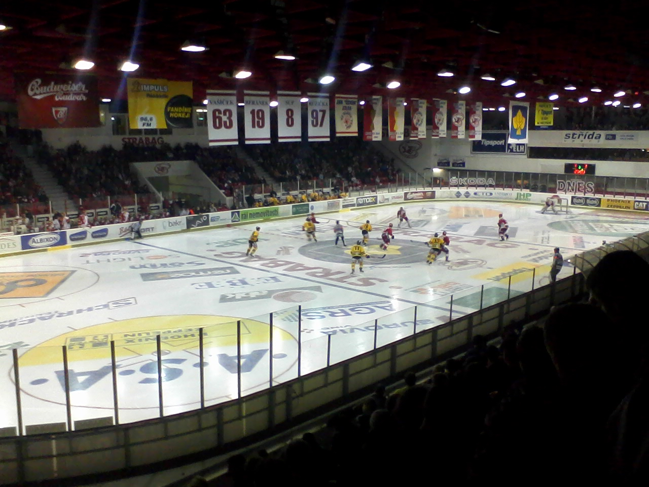 Zimní stadion Eden během utkání HC Slavia Praha - HC Verva Litvínov..